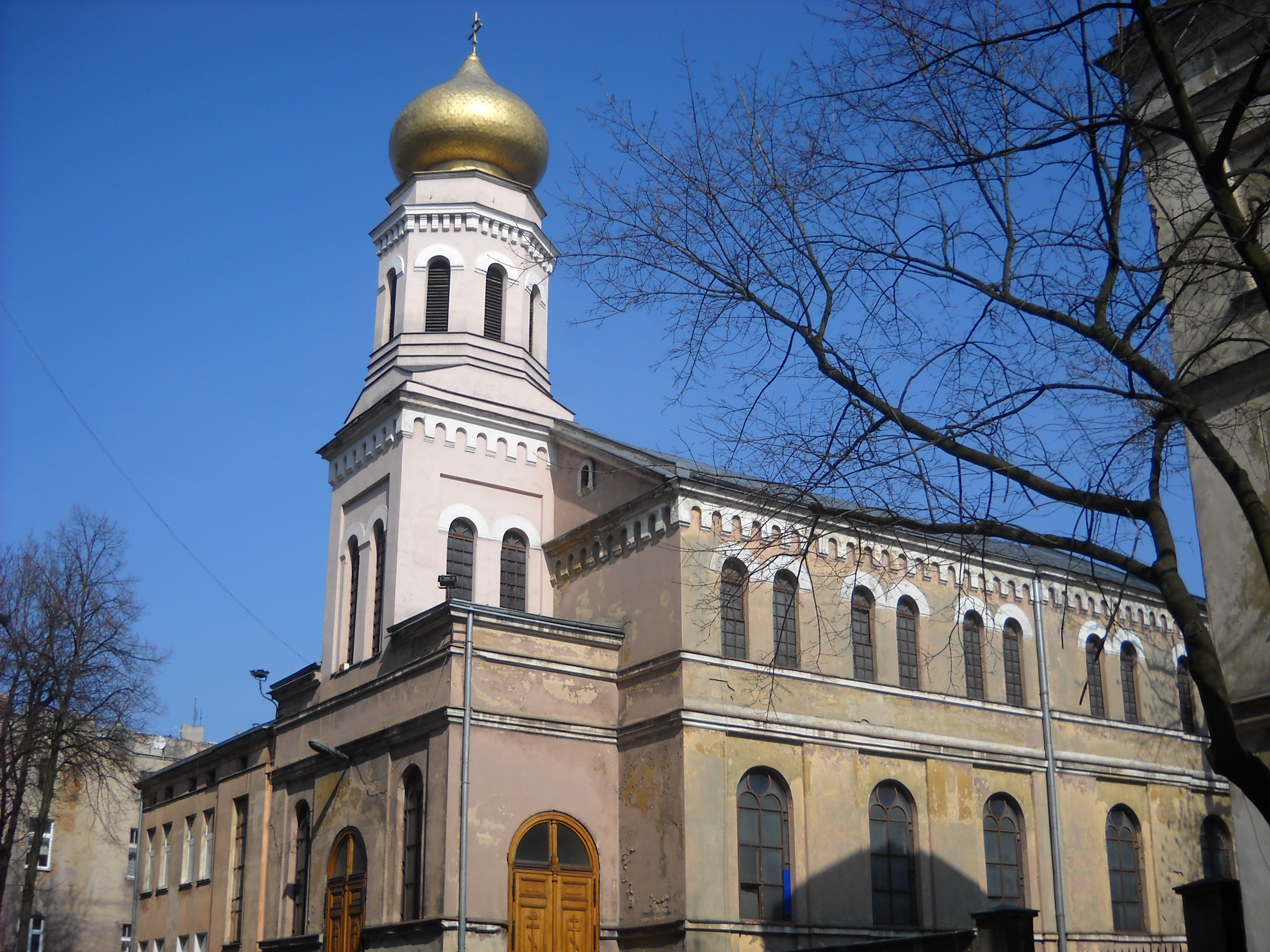 Cerkiew św. Olgi w Łodzi